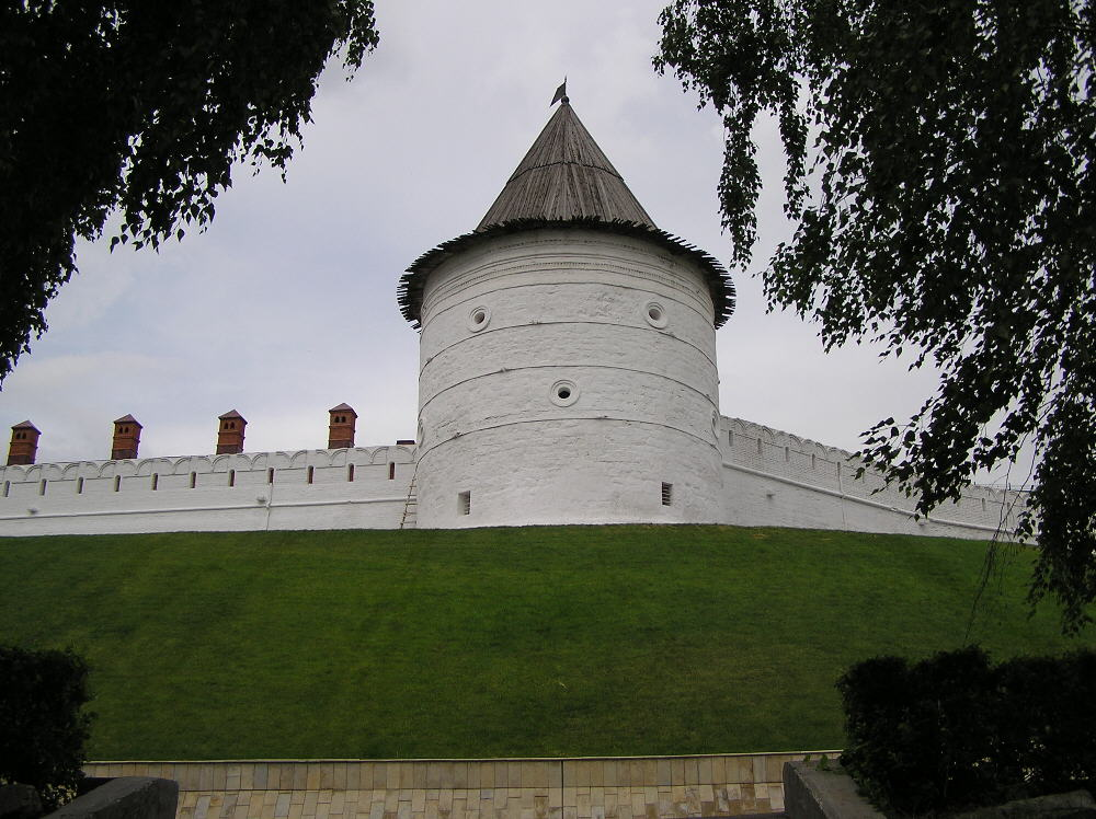 Кремль (18.06.2006)